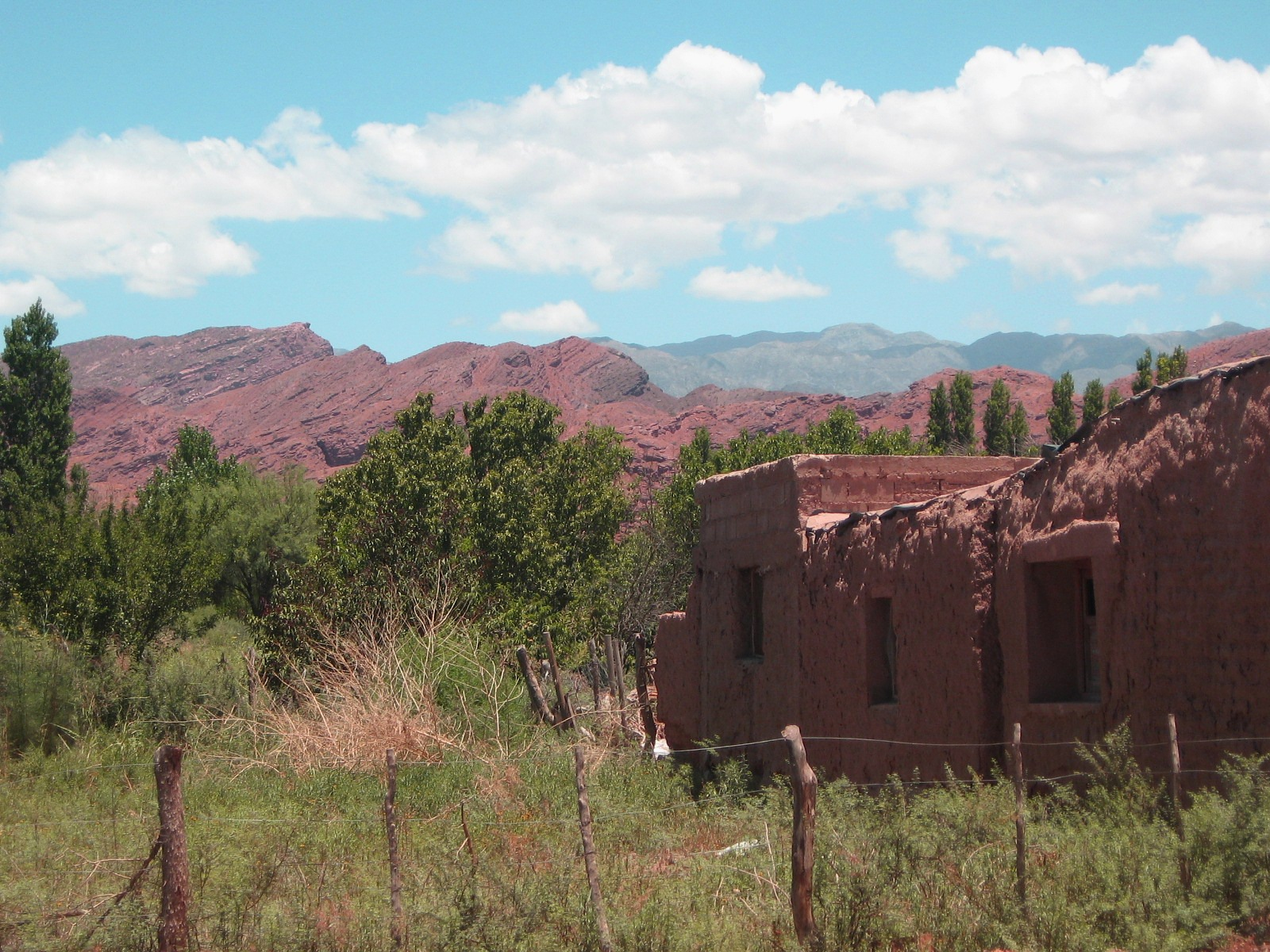 Construcción tradicional en la localidad de Banda Florida, en cercanías de Villa Unión, provincia de La Rioja